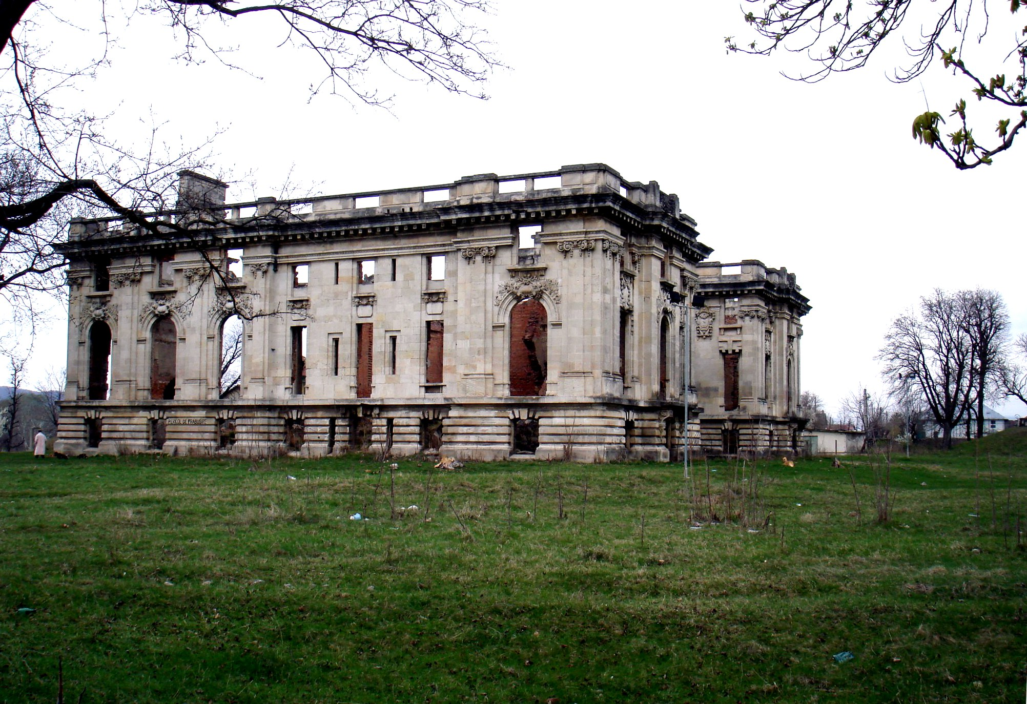 Ruinele palatului Cantacuzino (Micul Trianon) din Florești Prahova